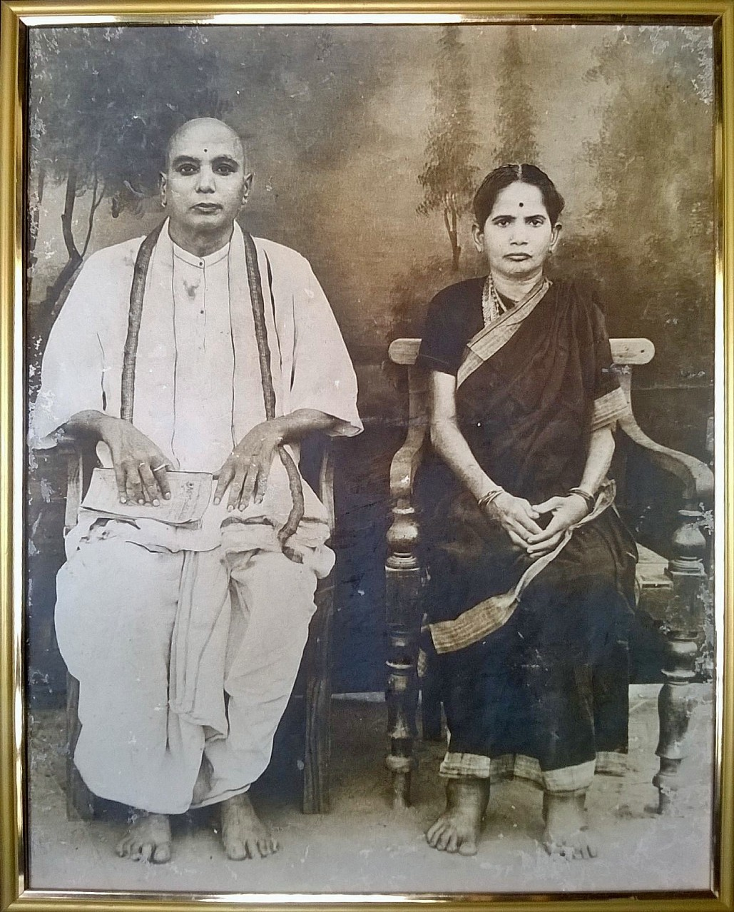 వీరి ఇంటిపేరు ఊలపల్లి, స్వంతఊరు పేరు ఊలపల్లి. ఊలపల్లి గ్రామం ఆంధ్రప్రాతము నందు తూర్పుగోదావరి జిల్లాలో గలదు. ఇది ప్రసిద్ధమైన పెద్ద ఊరు, యిద్దరు కరణముల పాలనలో ఉండెడిది. 20 శతాబ్ద ఉత్తరకాలంలోని కాలప్రభావం వలన పట్టణీకరణాల వలన వృద్ధి కుంటుపడింది. పెదకరణీకం వంశపారంపర్యంగా ఊలపల్లి వంశస్తుల వద్ద ఉండెడిది. ఆ విధంగా శ్రీ చిట్టిరాజుగారు పెద కరణీకం మంచి పేరుపొందారు. ఈ ఛాయాచిత్రం 1945 ప్రాంతంలో కాకినాడలో తీయబడినది. ఈ ఛాయా చిత్రము వీరి మనుమడు సాంబశివరావు, భాగవత గణనాధ్యాయి వద్ద కలదు. 2015ఫిబ్రవరిలో ఇక్కడ వికిమీడియాలో ఇతనిచే పెట్టబడినది. వీరి పిమ్మట వీరి పెద్ద కొడుకు వేంకట రమణారావు కరణీకం చేసారు. మిగిలిన పిల్లలు, మనవలు ప్రభుత్వ ఉద్యోగములు చేపట్టిరి.